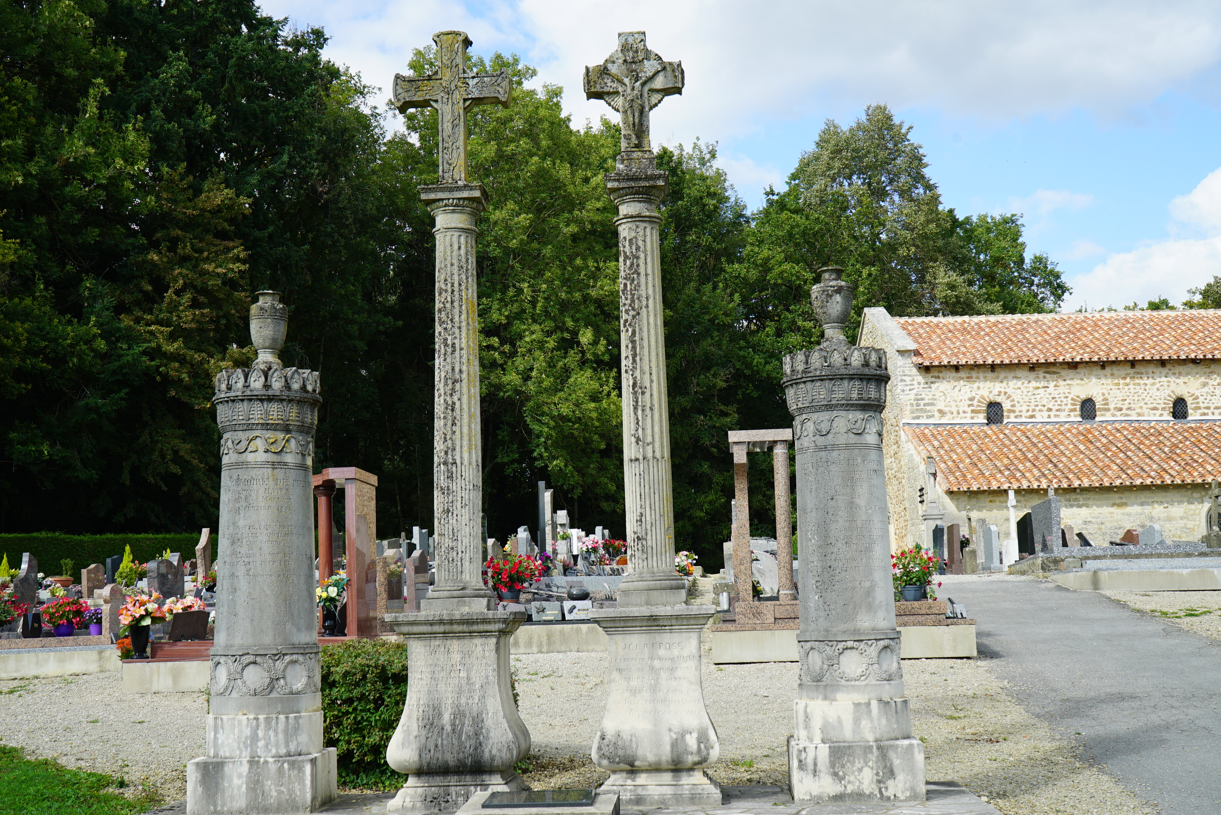 Chapelle Saint-Aubin de Moëslains .